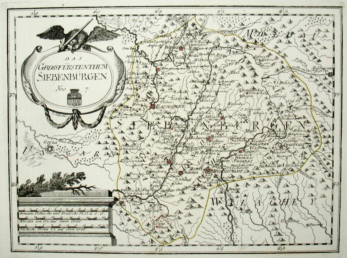 Das Grossfürstenthum Siebenbürgen. Nro. 7. Kolorierter Kupferstich